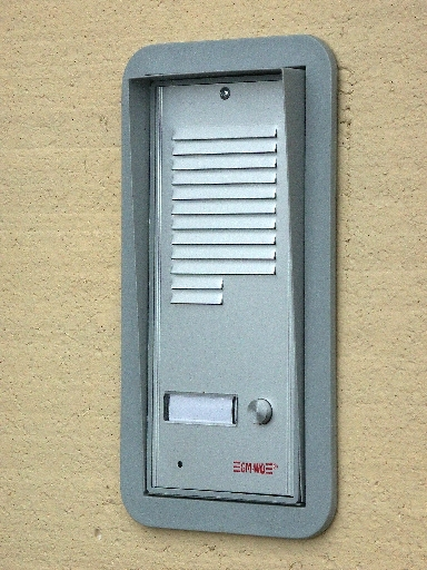 Kaseta 4lx-1nr (domofon)